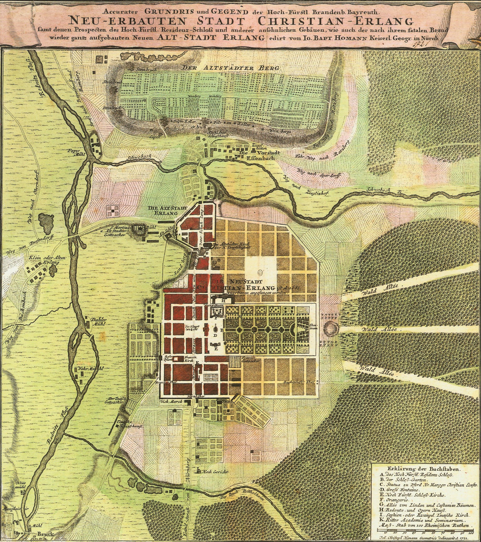 Grundriss von Alt- und Neustadt Erlangen sowie Umgebung. Kolorierter Kupferstich (1721) von Johann Christoph Homann, verlegt von Johann Baptist Homann.